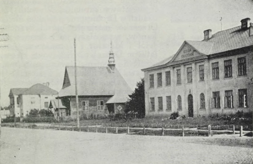 Беларуская (тарашкевіца): Дарагічын (Darahičyn), вуліца Касьцельная (vulica Kaścielnaja). Касьцёл